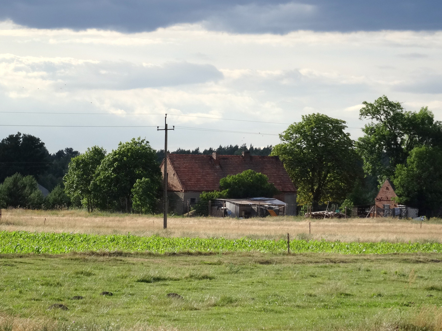 Nowa Wioska, gmina Nowa Wieś Wielka, powiat bydgoski